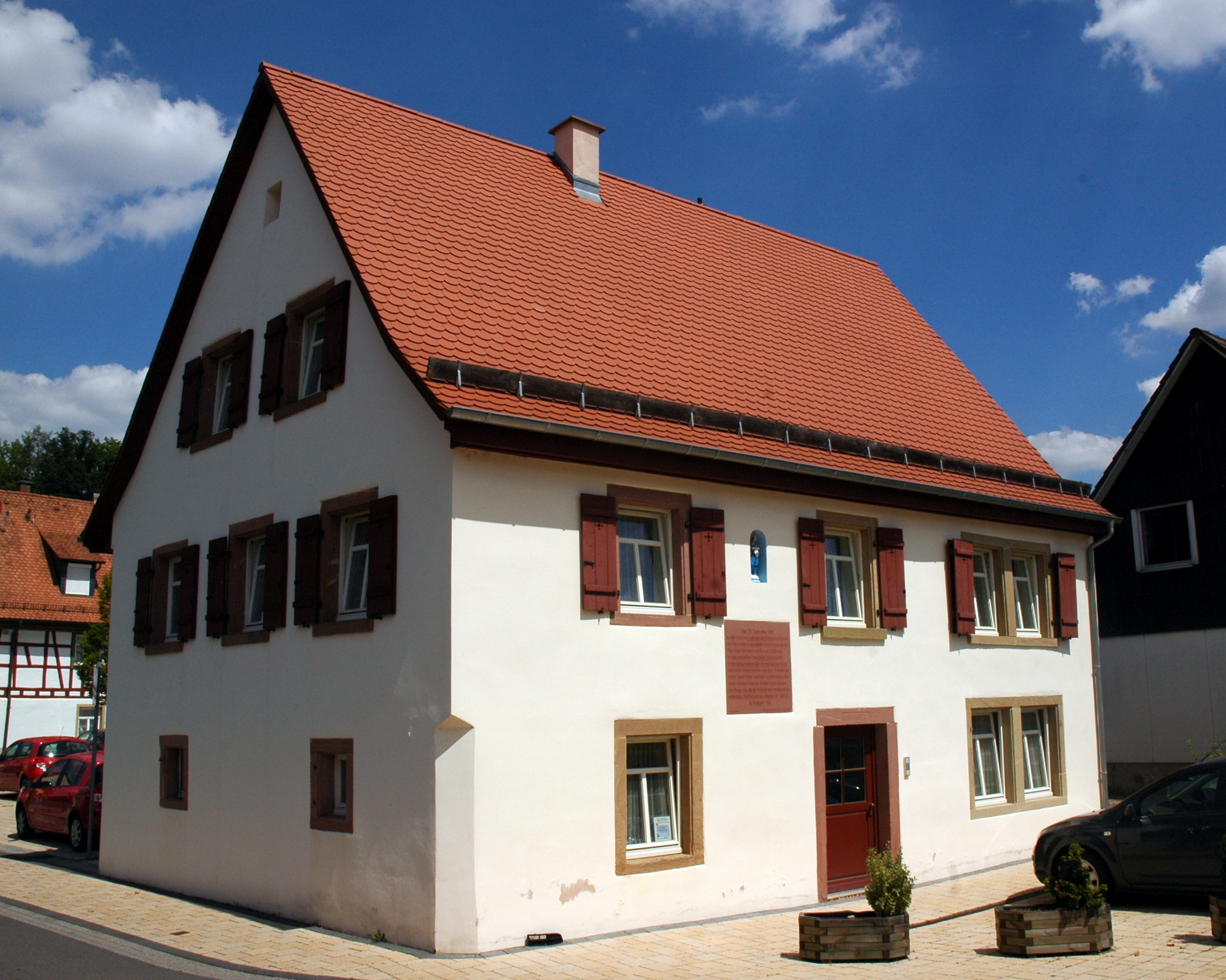 Prof.-Kehrer-Straße 12 (Meckesheim)